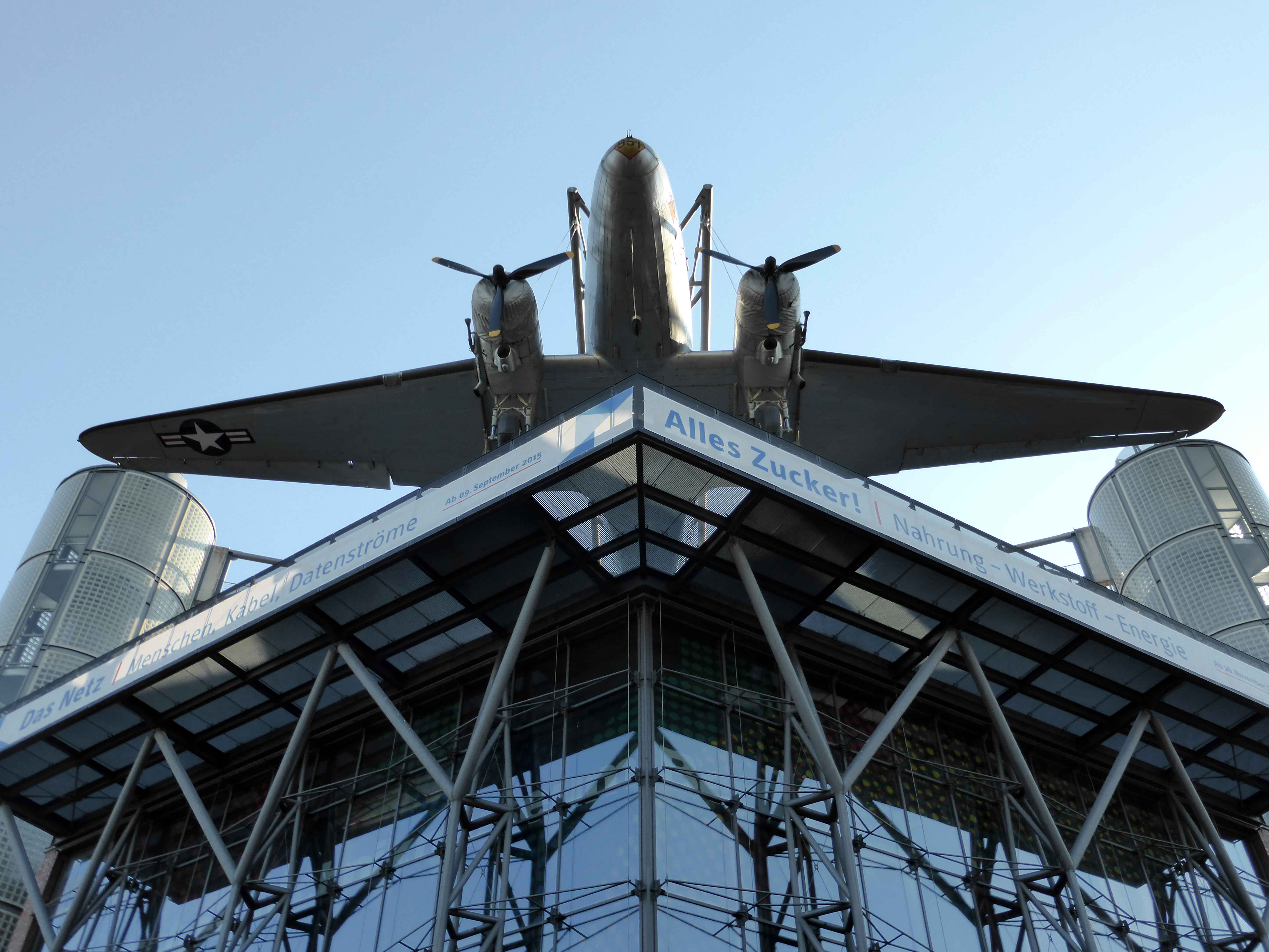 Deutsches Technikmuseum in Berlin. Wikipedianische KulTour am 10. Oktober 2015 in der Ausstellung des Museums.